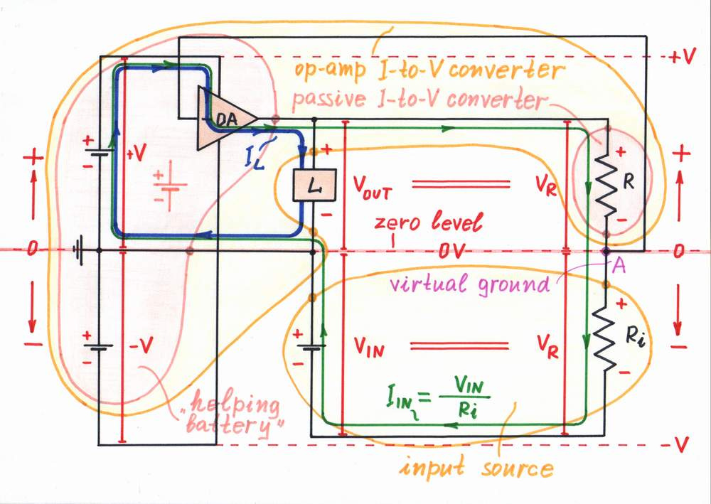 Op-amp inverting current-to-voltage converter (at negative input voltage)